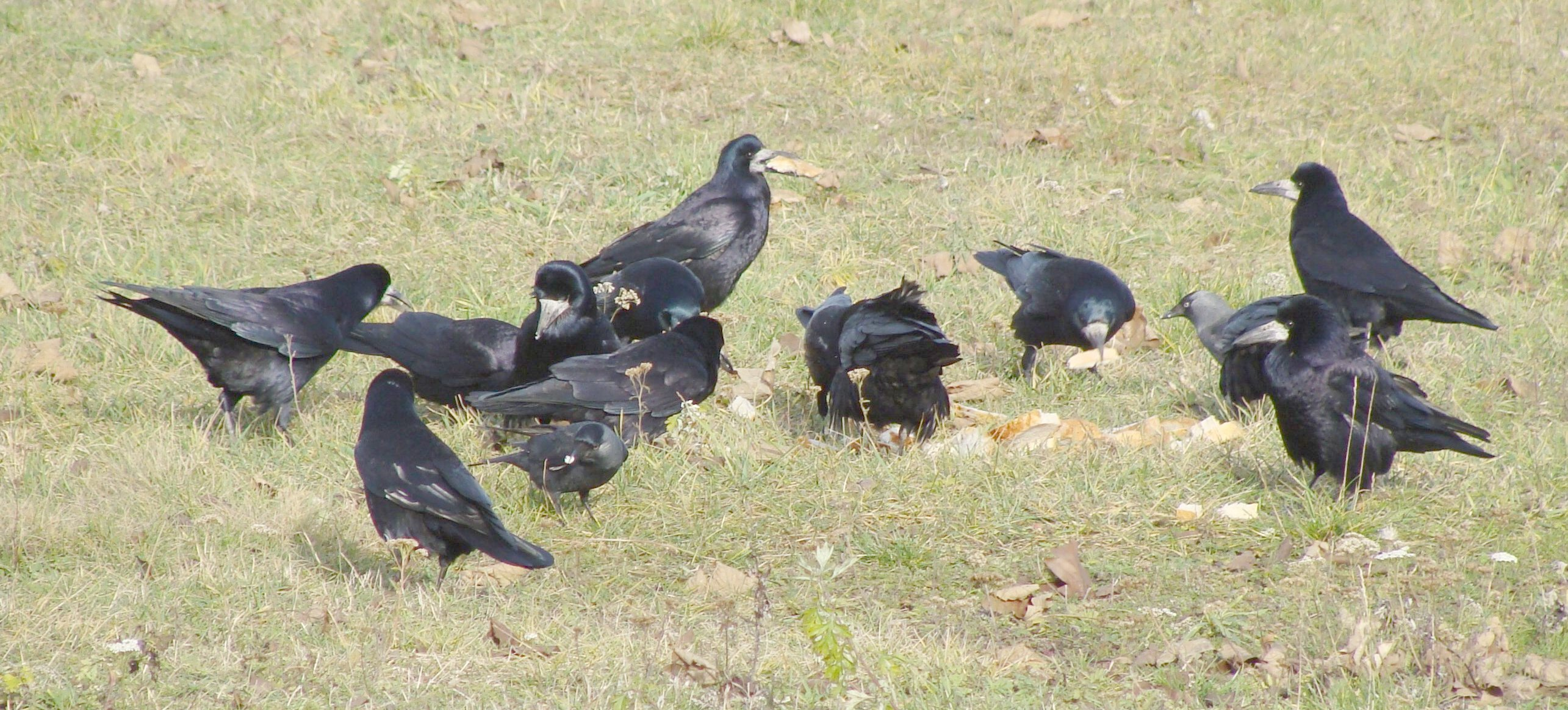 Dokarmianie gawronów